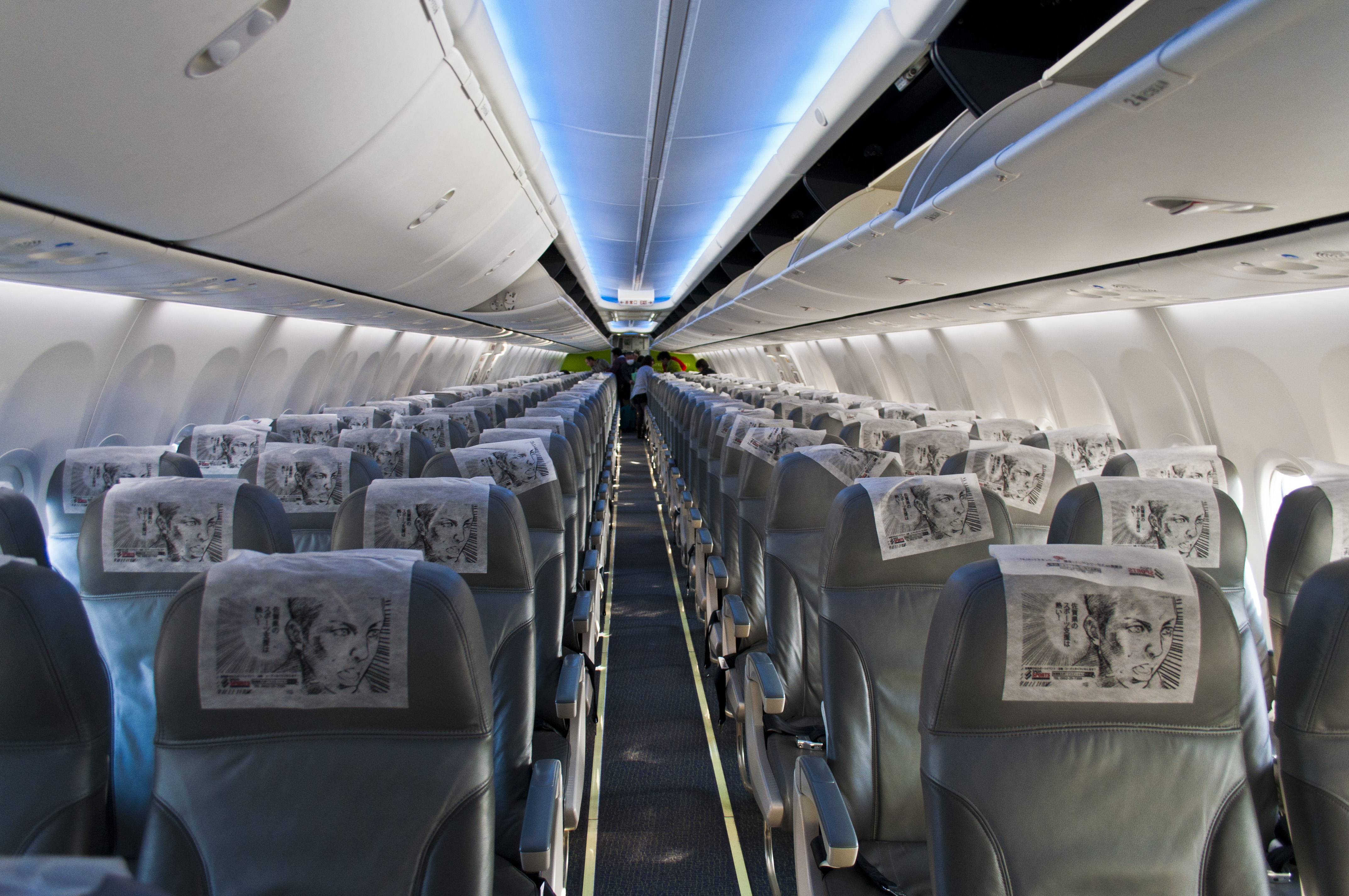 春秋航空日本 ボーイング737-800の機内